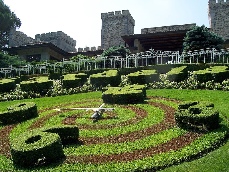 Gardaland - Orologio floreale